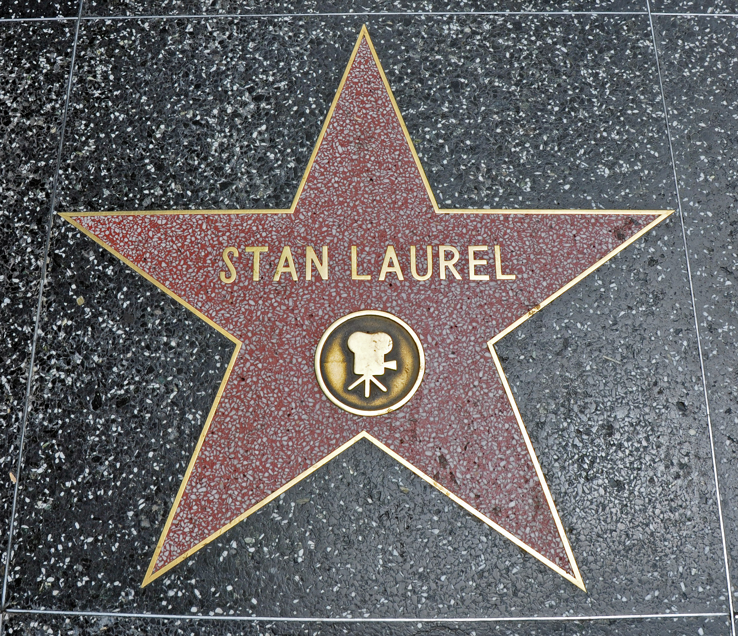 Stella di Stan Laurel (Stanlio di Stanlio e Ollio) sulla Hollywood Walk of Fame - Agosto 2011.